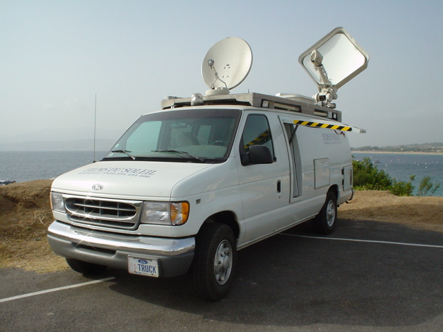 SNG Ford